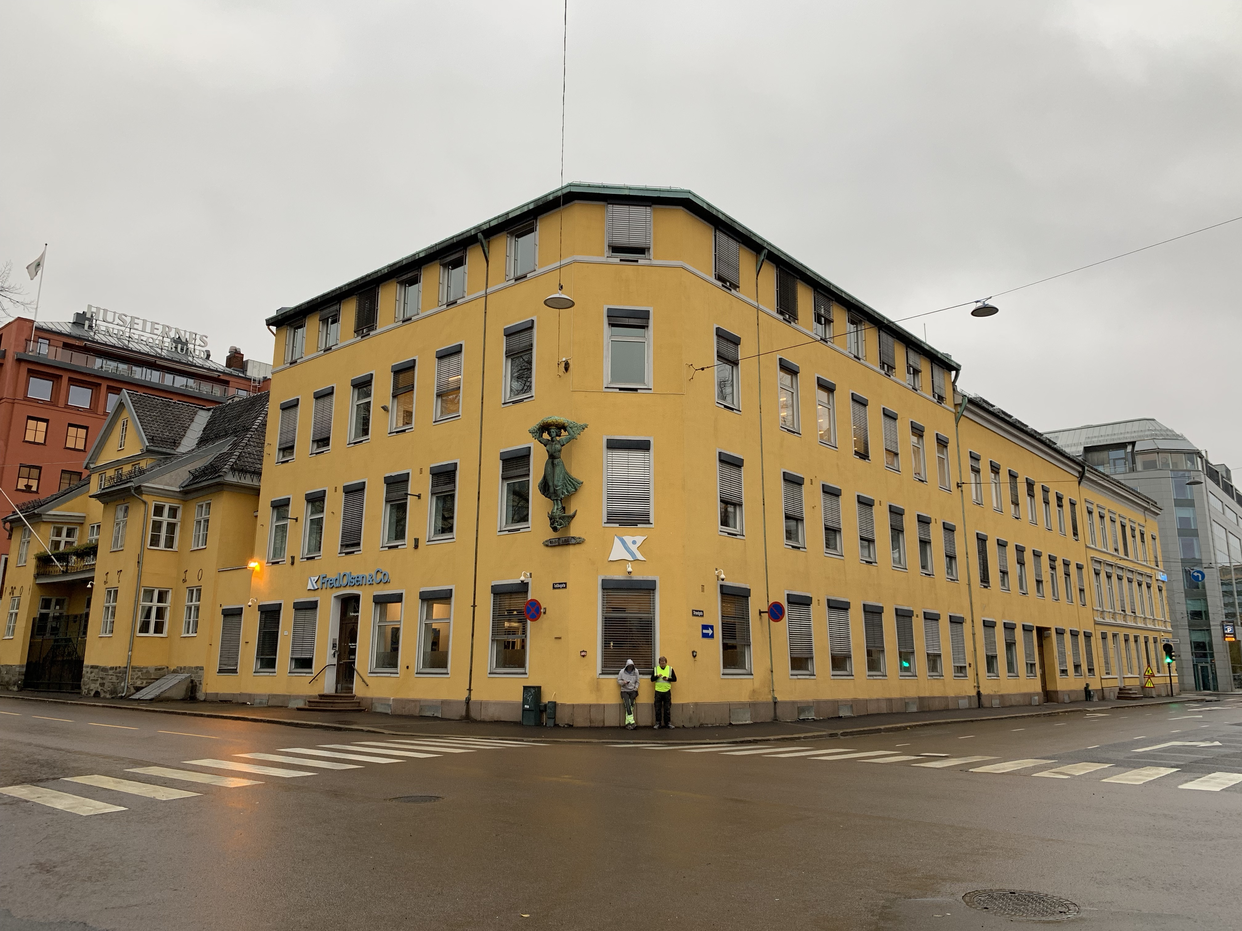 Tollbugata 1b i Oslo.